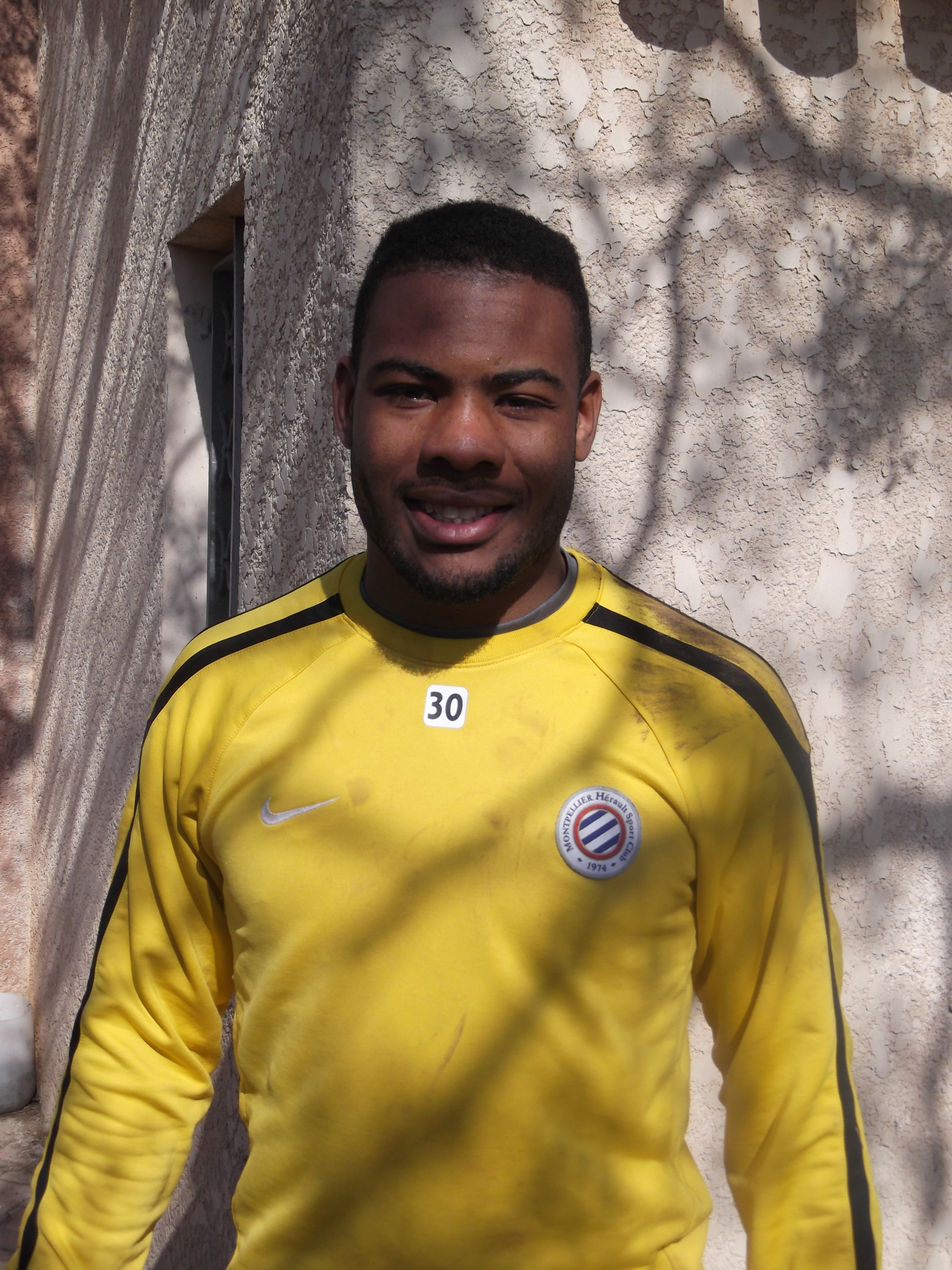 Jonathan Ligali à l’entraînement.